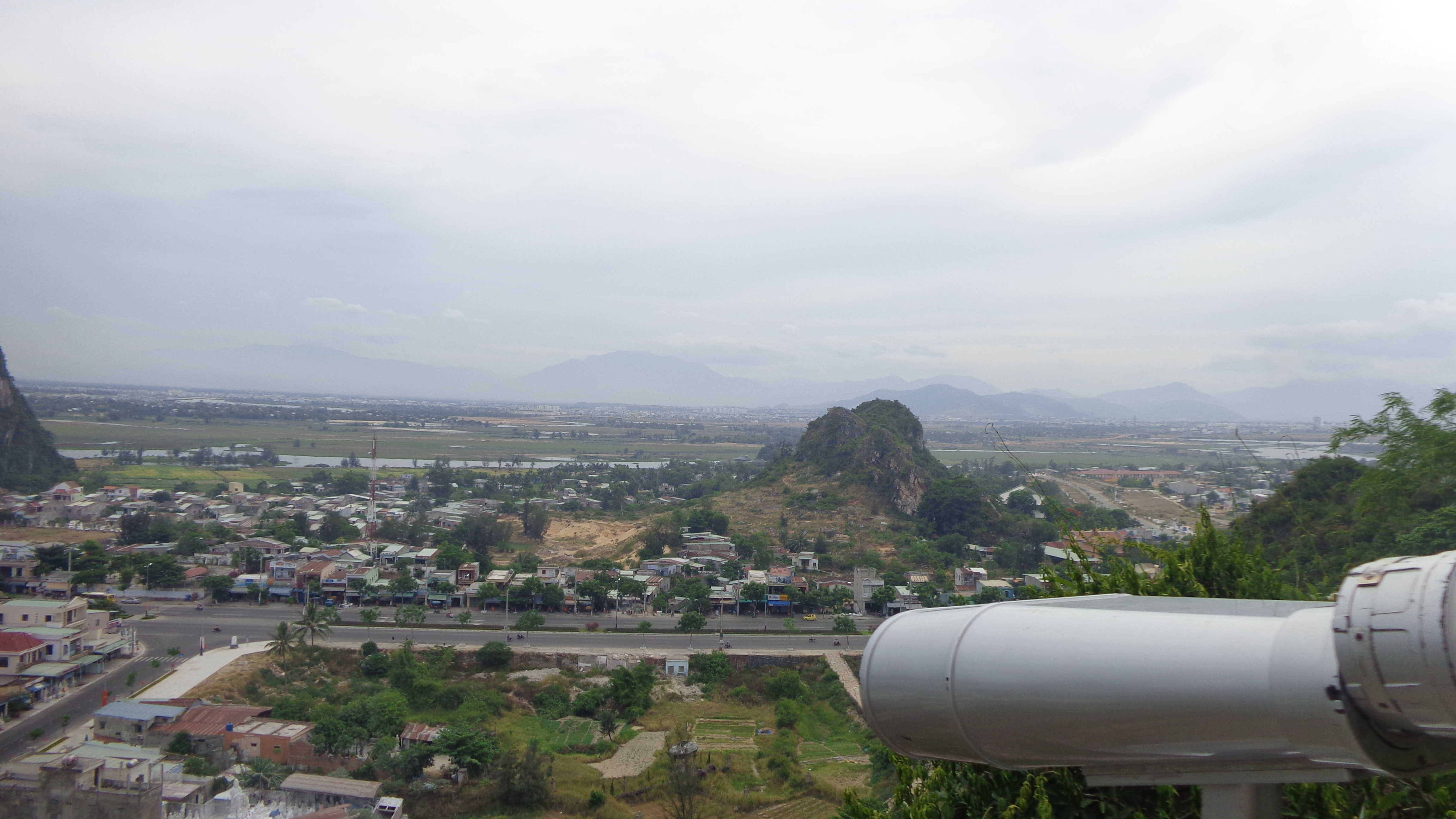 Ngọn Thổ Sơn trong cụm núi Ngũ Hành Sơn (tây bắc cụm) phường Hòa Hải quận Ngũ Hành Sơn Đà Nẵng (bên phải đường Đà Nẵng-Hội An).